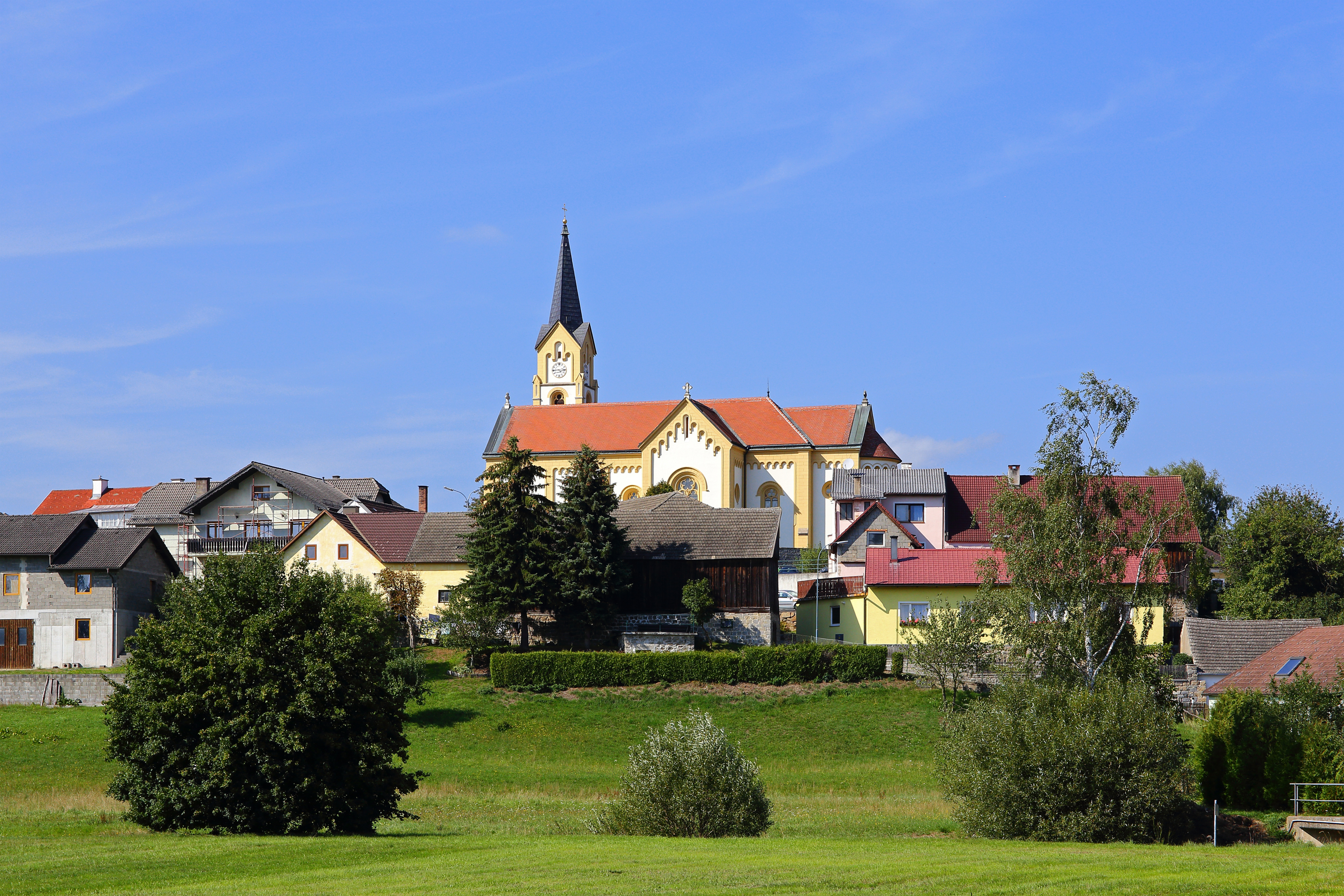 Die im Südteil von Langschwarza gelegene Pfarrkirche hl. Ägydius ist eine neoromanische Saalkirche mit Querarmen und Nordturm.